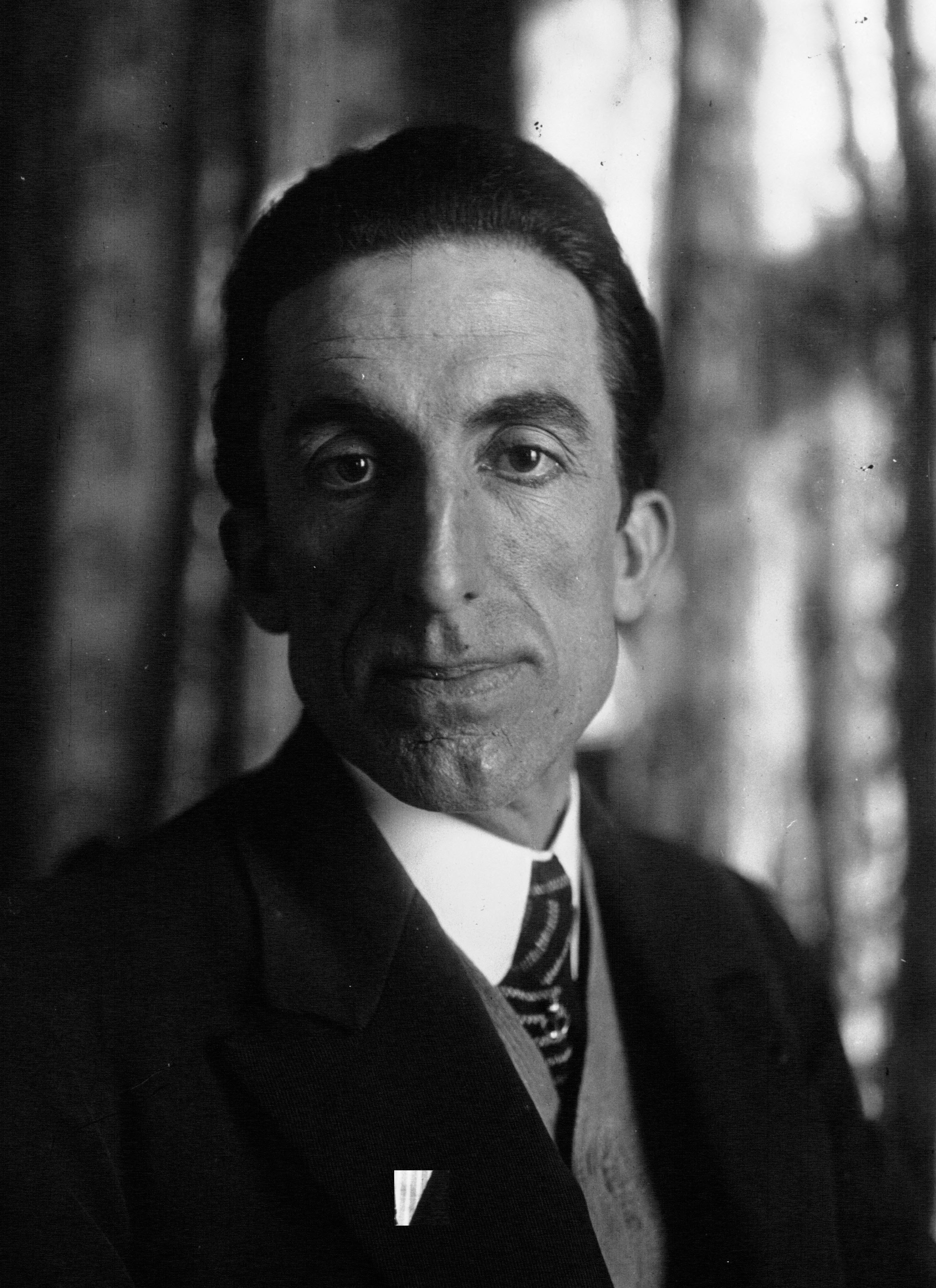 M. Le Prieur officier de marine (gros plan).